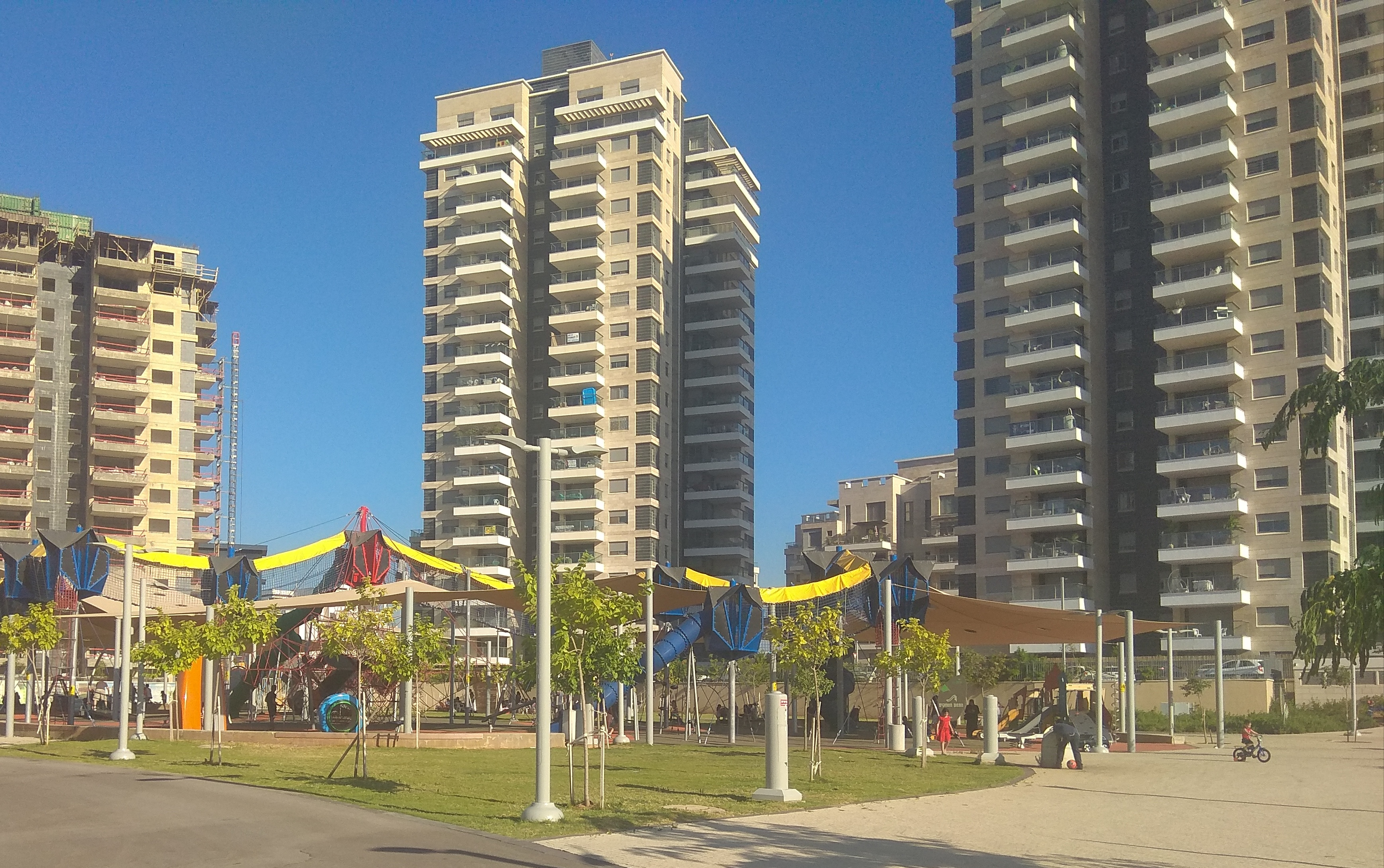 מגדלי דירות על רקע הפארק